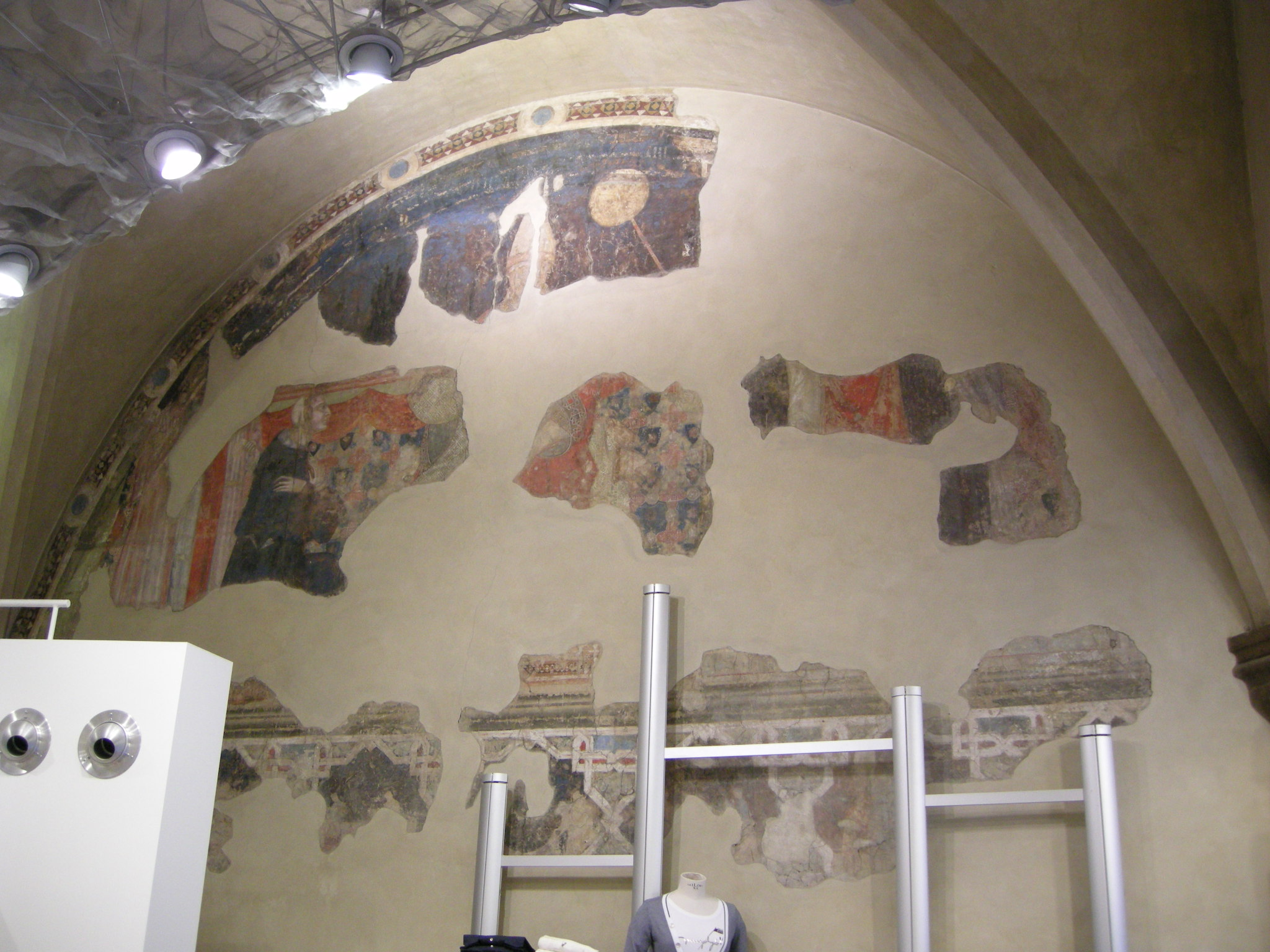 Palazzo dell'arte della lana, affreschi trecenteschi